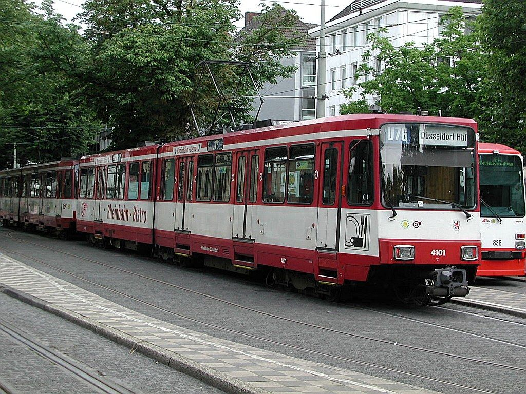 Rheinbahn Tw 4101 in der Haltestelle Krefeld-Rheinstraße